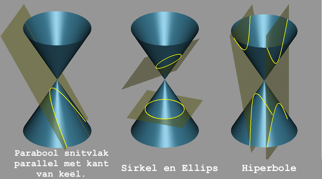 Grafiese uitbeelding van keëlsnitte.